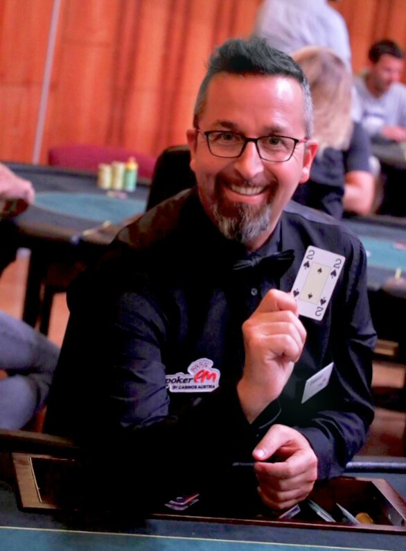 Il idn poker Macaupoker99 adalah situs poker online Indonesia Terpercaya Agen judi Uang Asli Domino Qiu Qiu Resmi Dengan sistem progressive jackpot terbesar yang dapat anda raih disini.